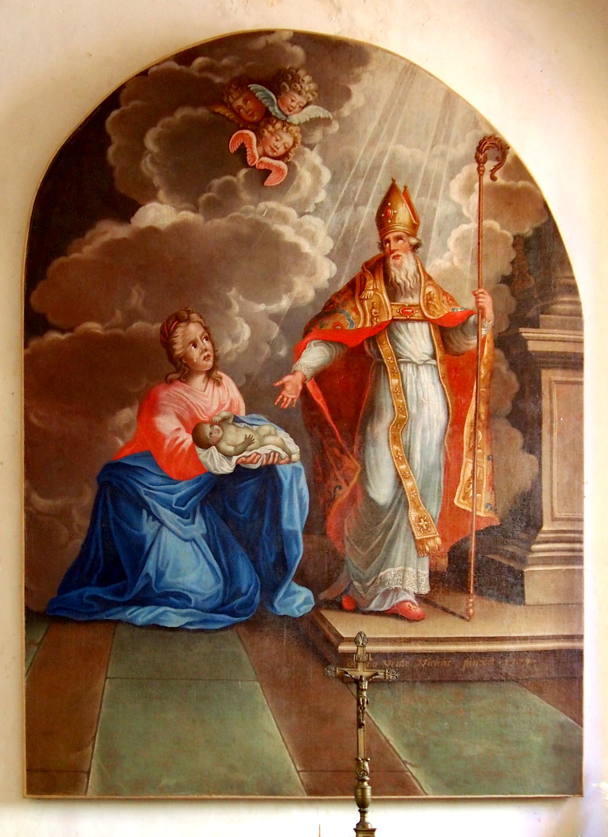 Montchamp (Normandie, France). Le tableau Saint Martin ressuscitant un enfant dans l'église Saint-Martin.